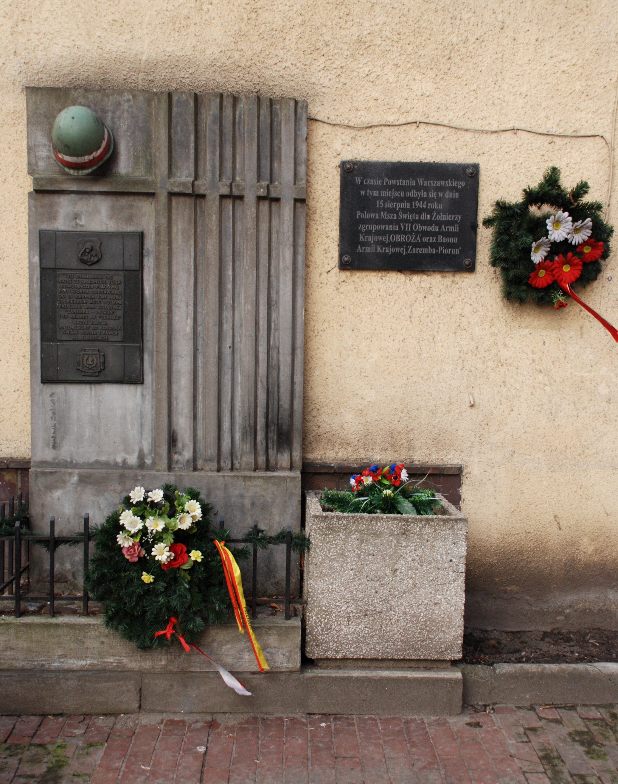 Miejsce pamięci w Warszawie przy ul. Poznańskiej (fot Zu)